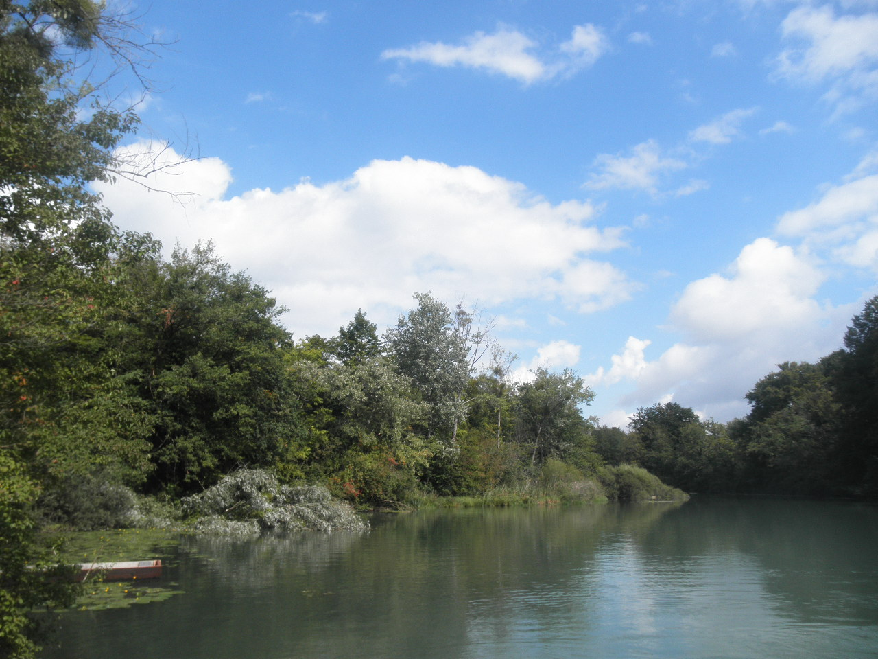 impreso de la natura parko Taubergießen